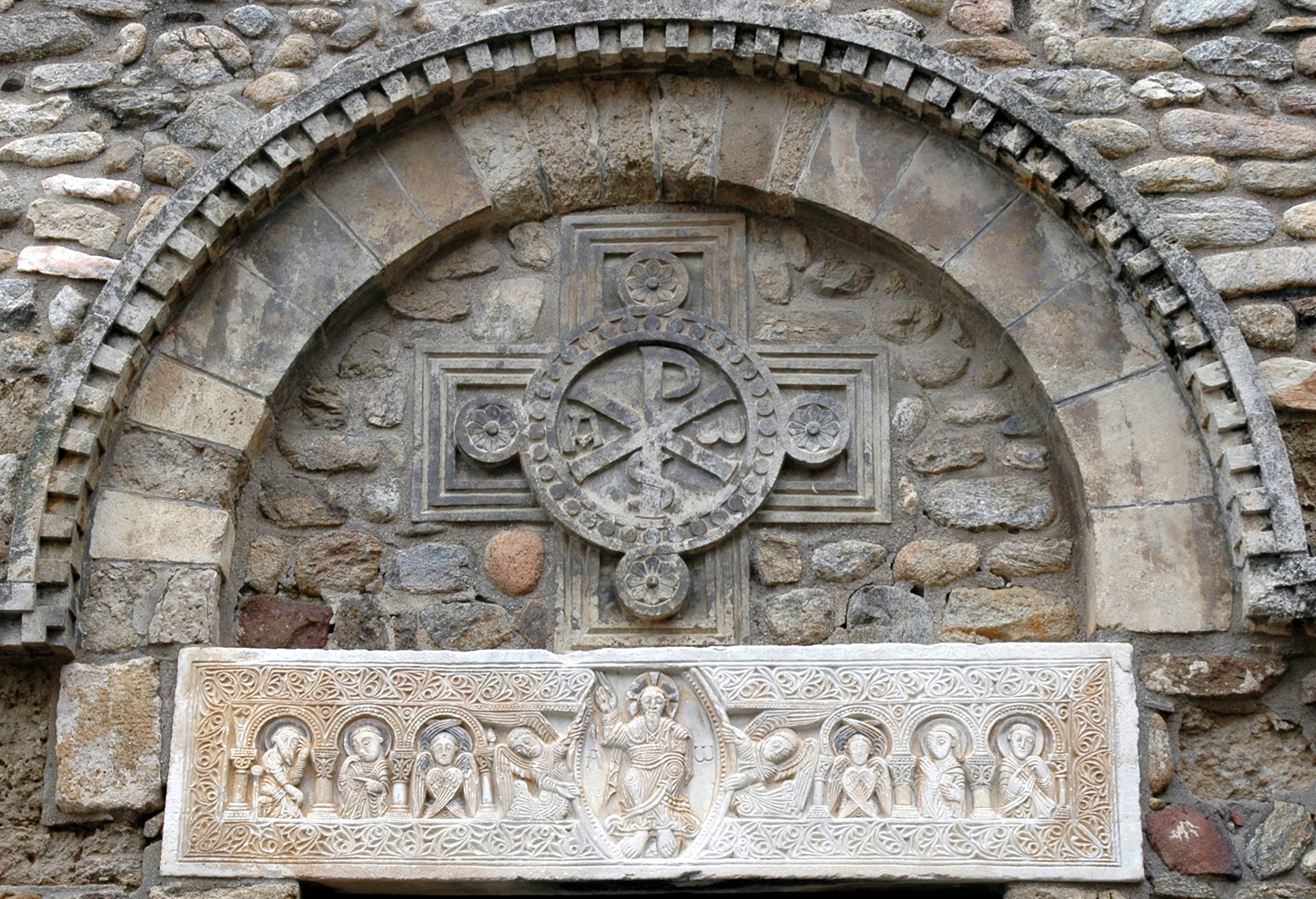 Sant Andreu de Sureda - Llinda